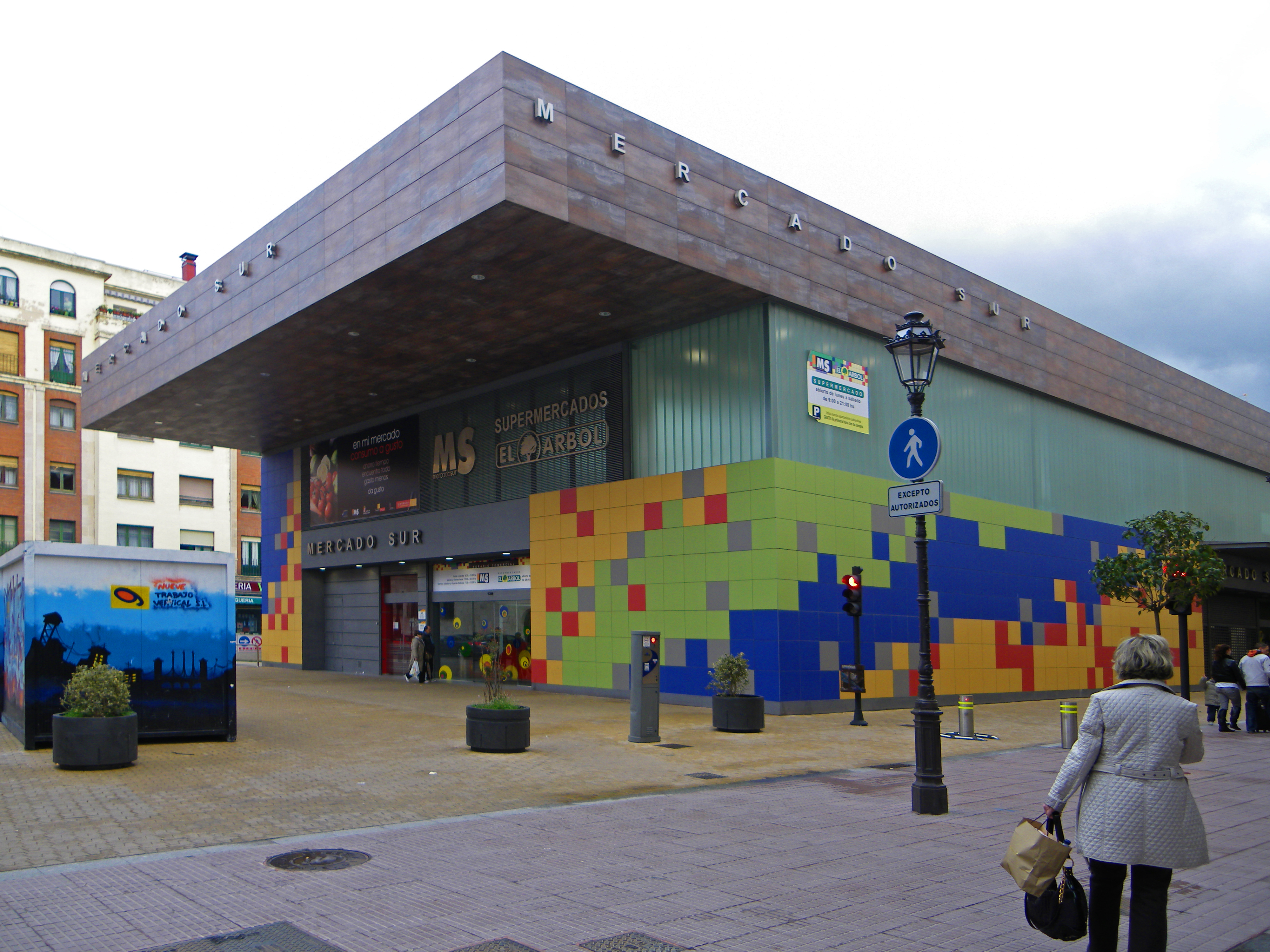 Vista externa del Mercado Sur de Burgos.